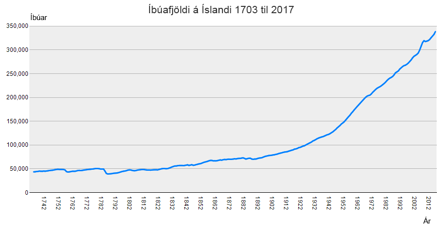 Gögn frá Hagstofu Íslands. Graf gert af